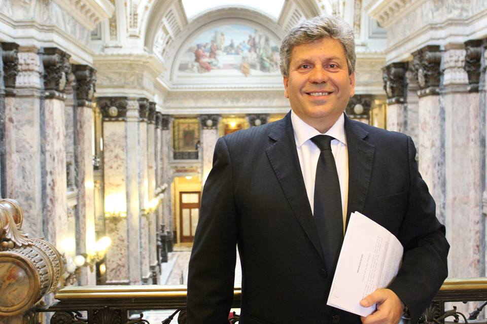 En el Palacio Legislativo